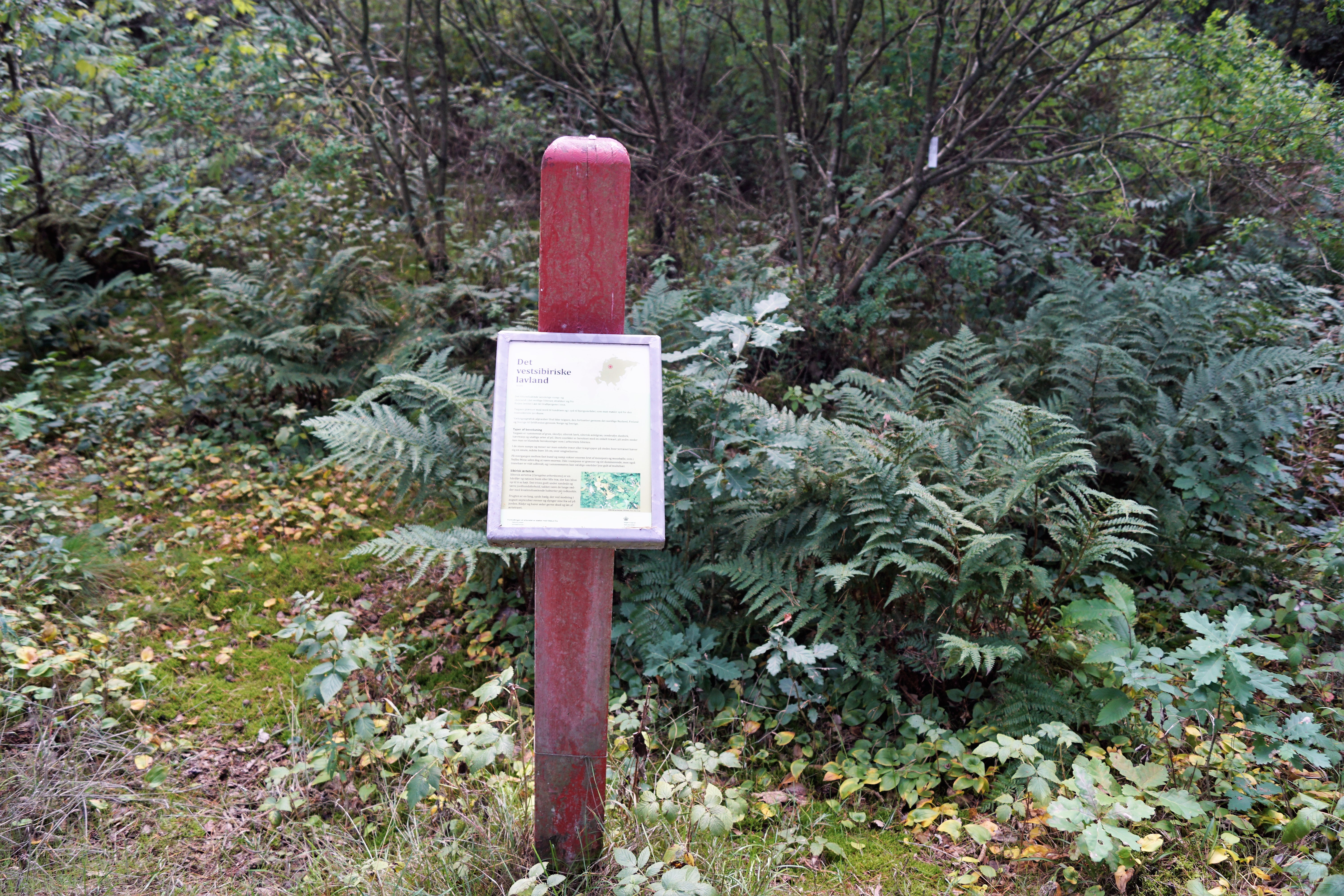 Vådbunds-arboret infotavle